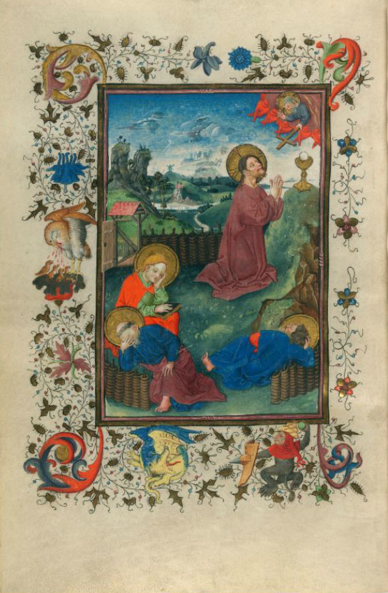 Getijden van Katharina van Kleef: De wake van Christus in de olijfhof Morgan Library M.917 p.120